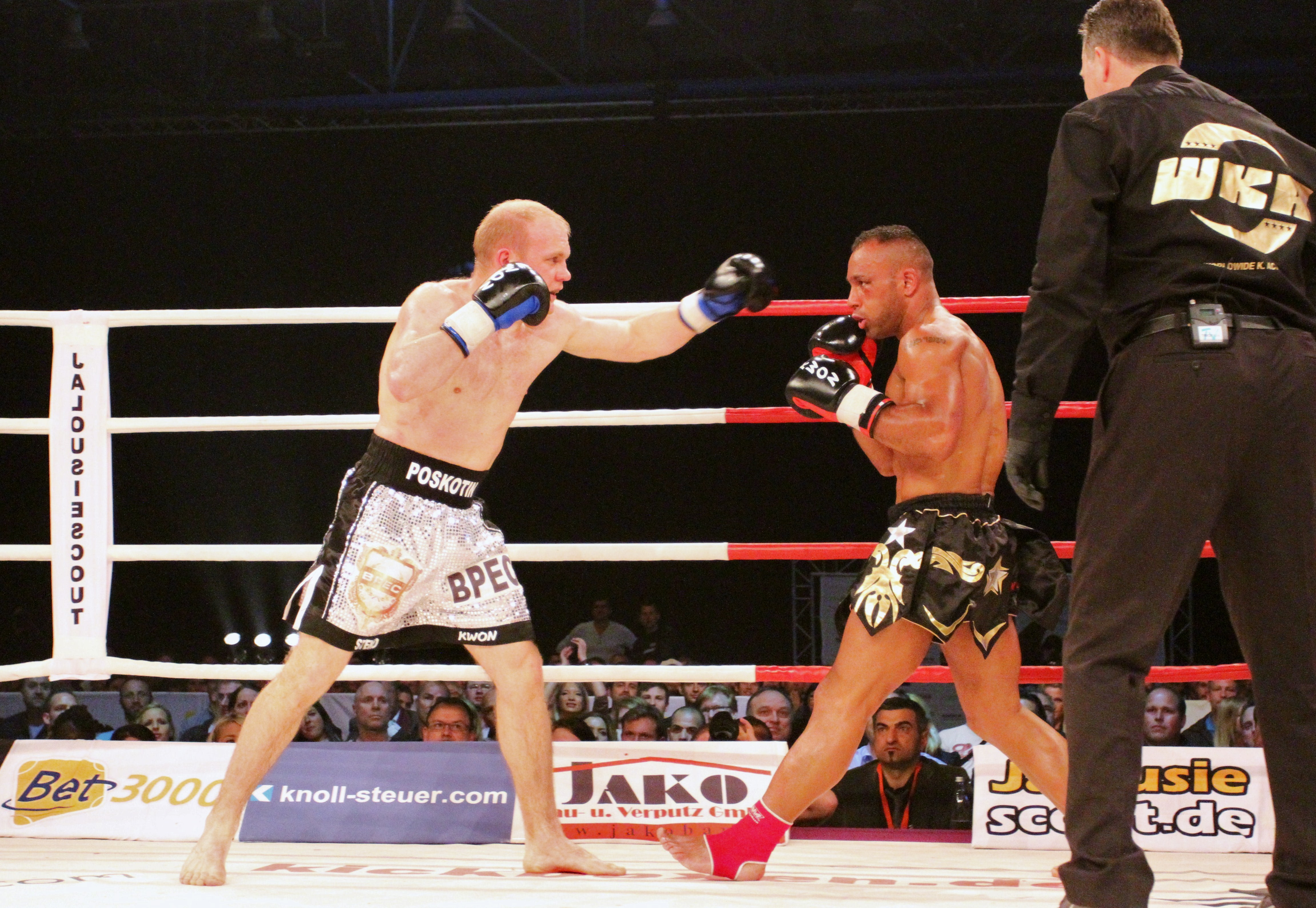 Kickbox-Weltmeister Semen Poskotin (D) vs. Willy Borrel (F)